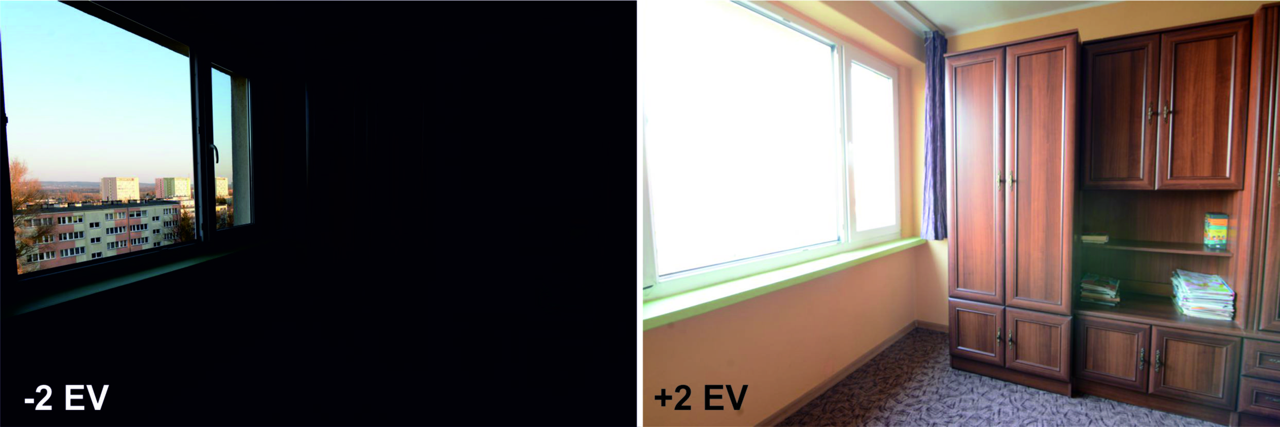 Fotografie (o kompensacji ekspozycji -2 EV i +2 EV) wykorzystane do stworzenia zdjęcia HDR